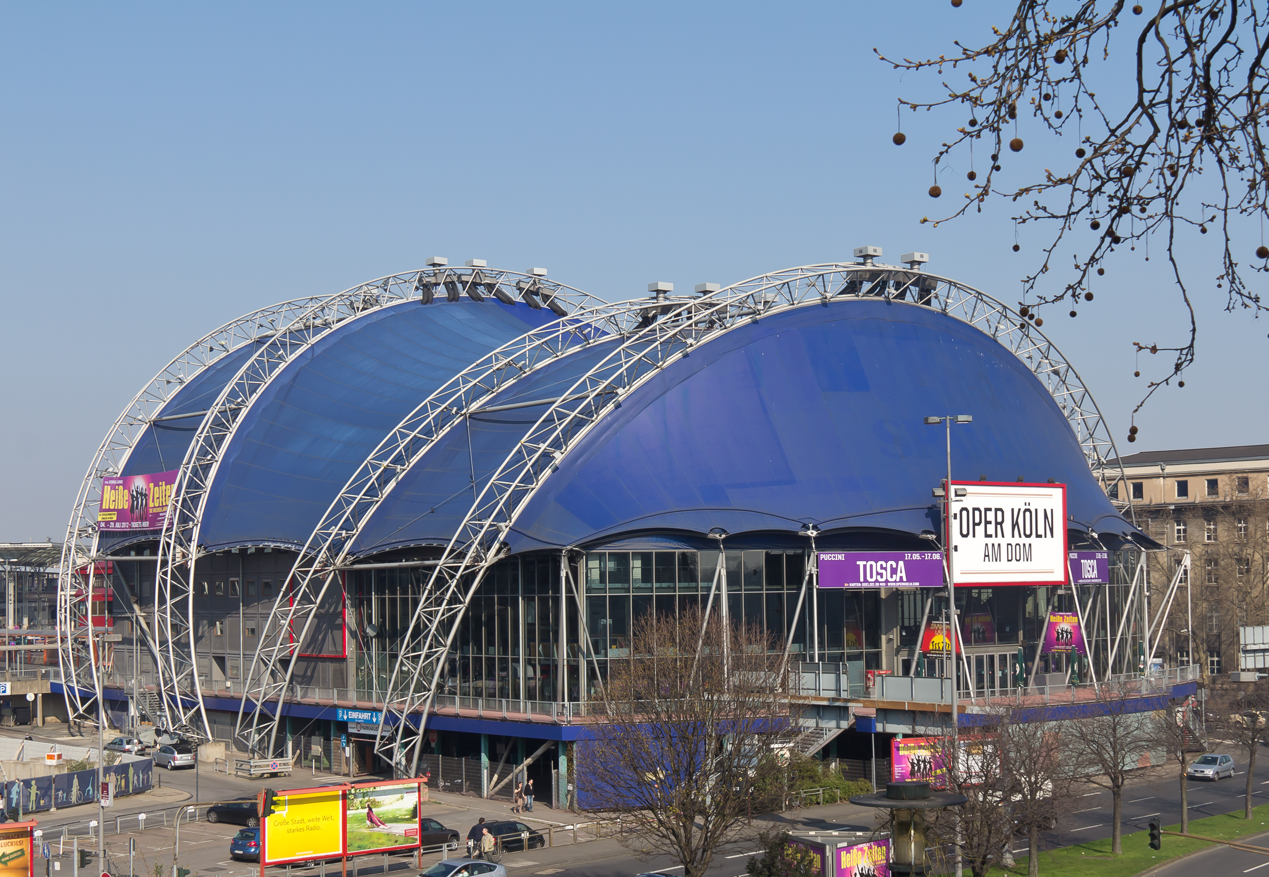 Die bisher „Musical Dome“ genannte Zeltkonstruktion am Breslauer Platz, Köln, wird während er Sanierungsphase des Opernhauses am Offenbachplatz zur Hauptspielstätte der Oper und heißt nun „Oper am Dom“